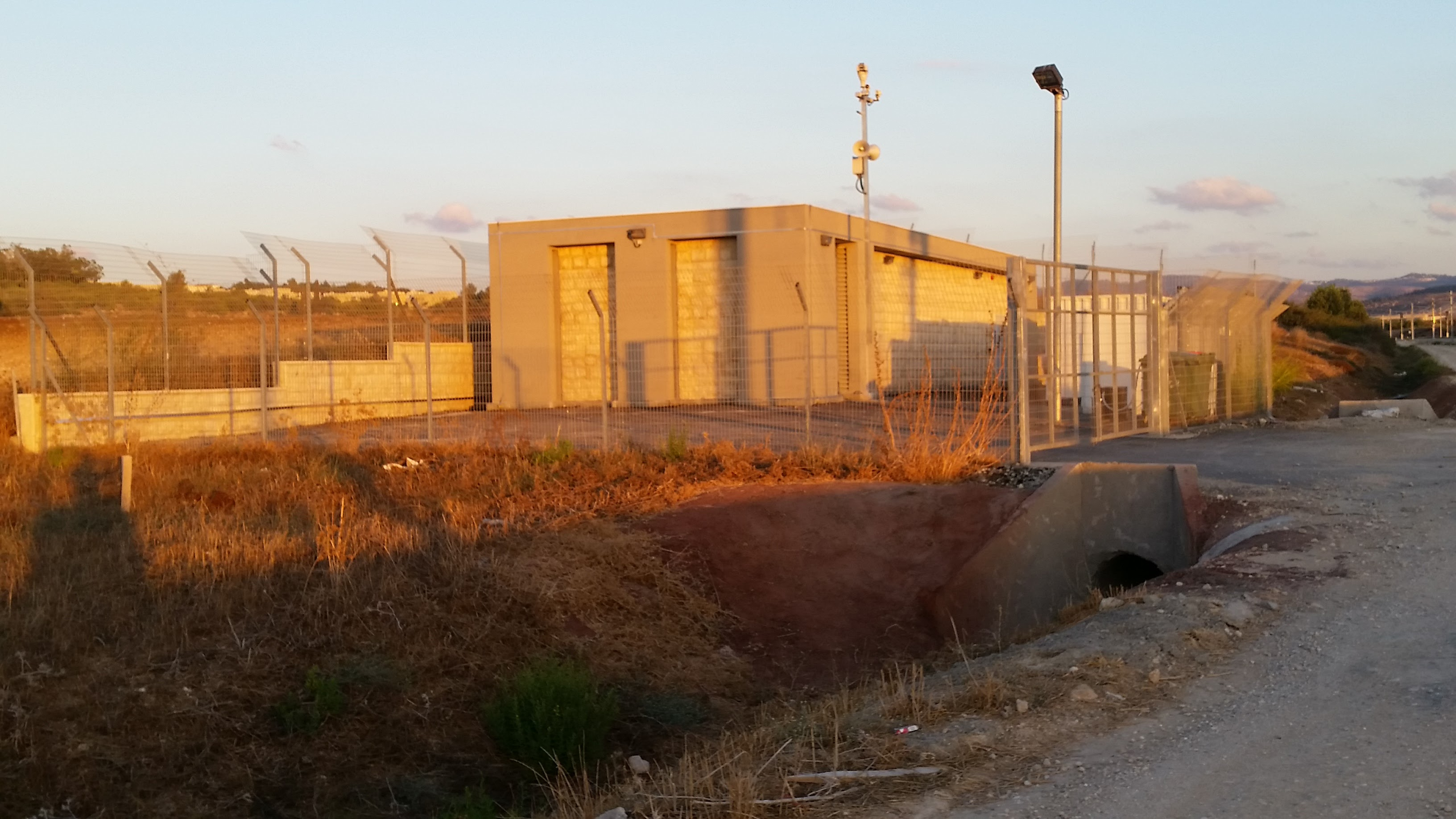 מבנה שו"ב איילון על הקו תל אביב - ירושלים מערבית לגשר מס' 6 ליד שעלבים